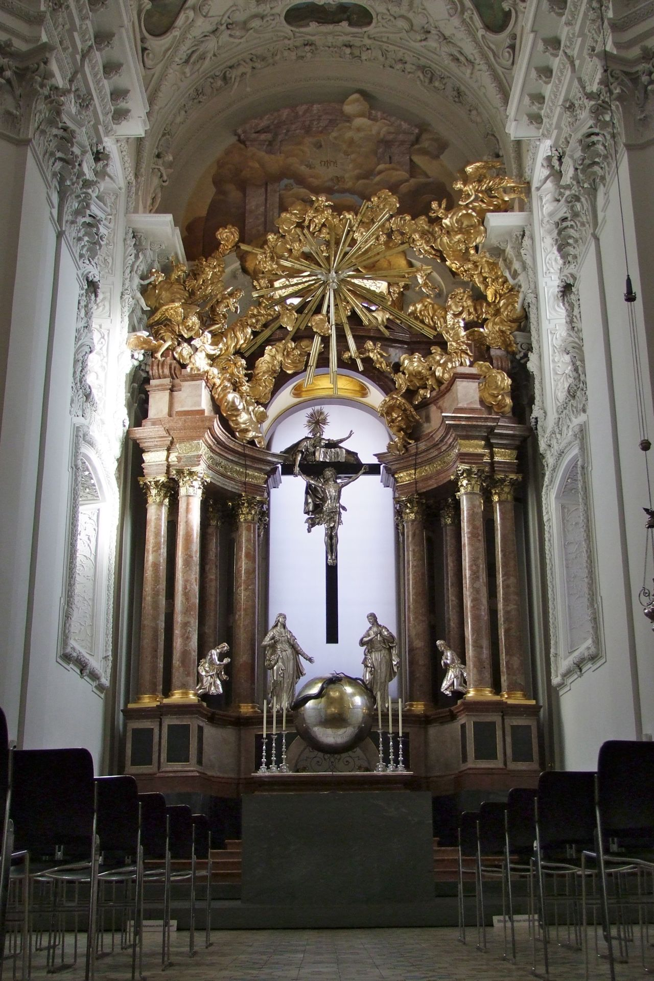 Basilika Minor, Pfarr- und Wallfahrtskirche Maria Geburt mit Kirchhof